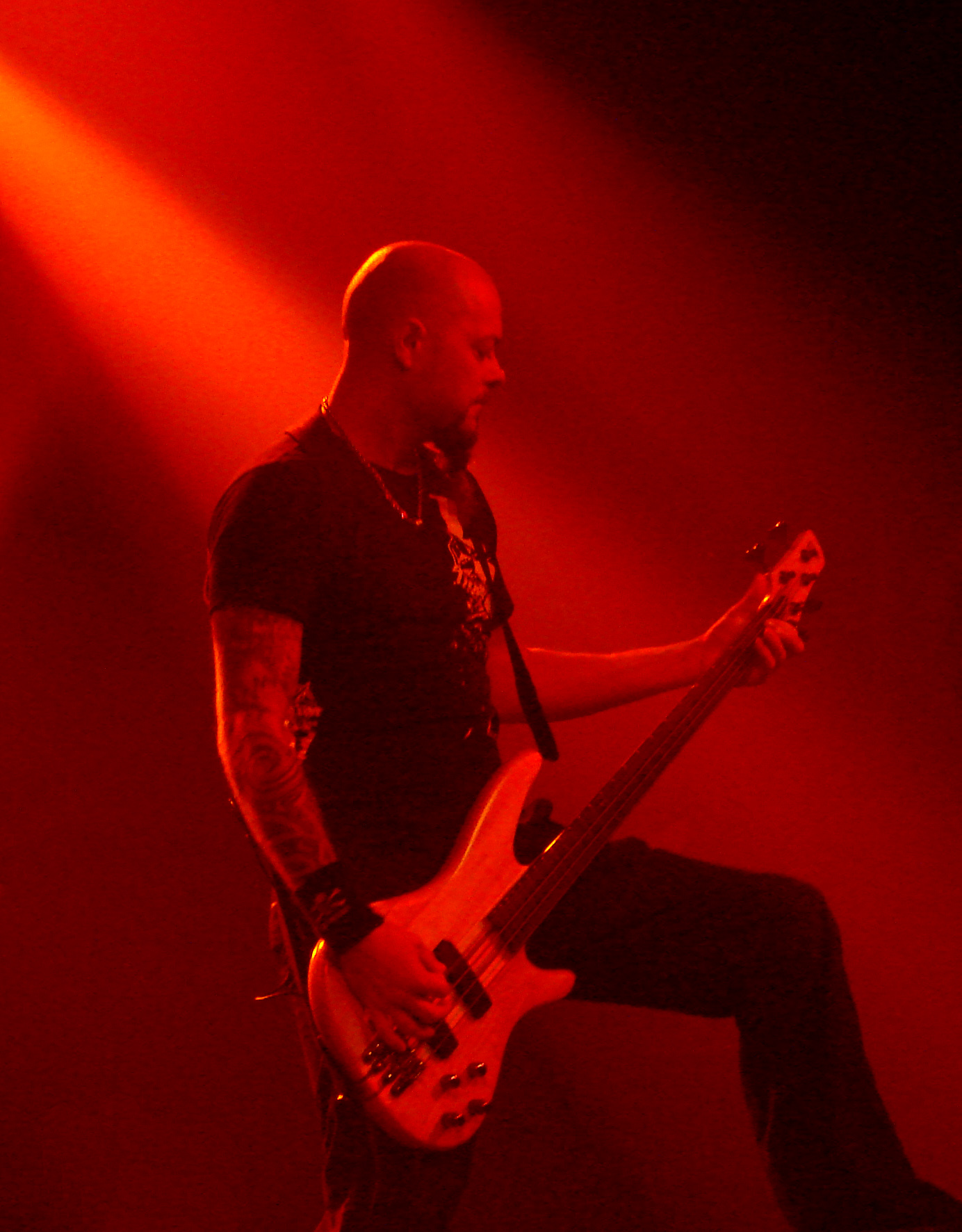 Dark Tranquillity, concert du 12/10/07 à la Locomotive à Paris. Michael Nicklasson à la basse.